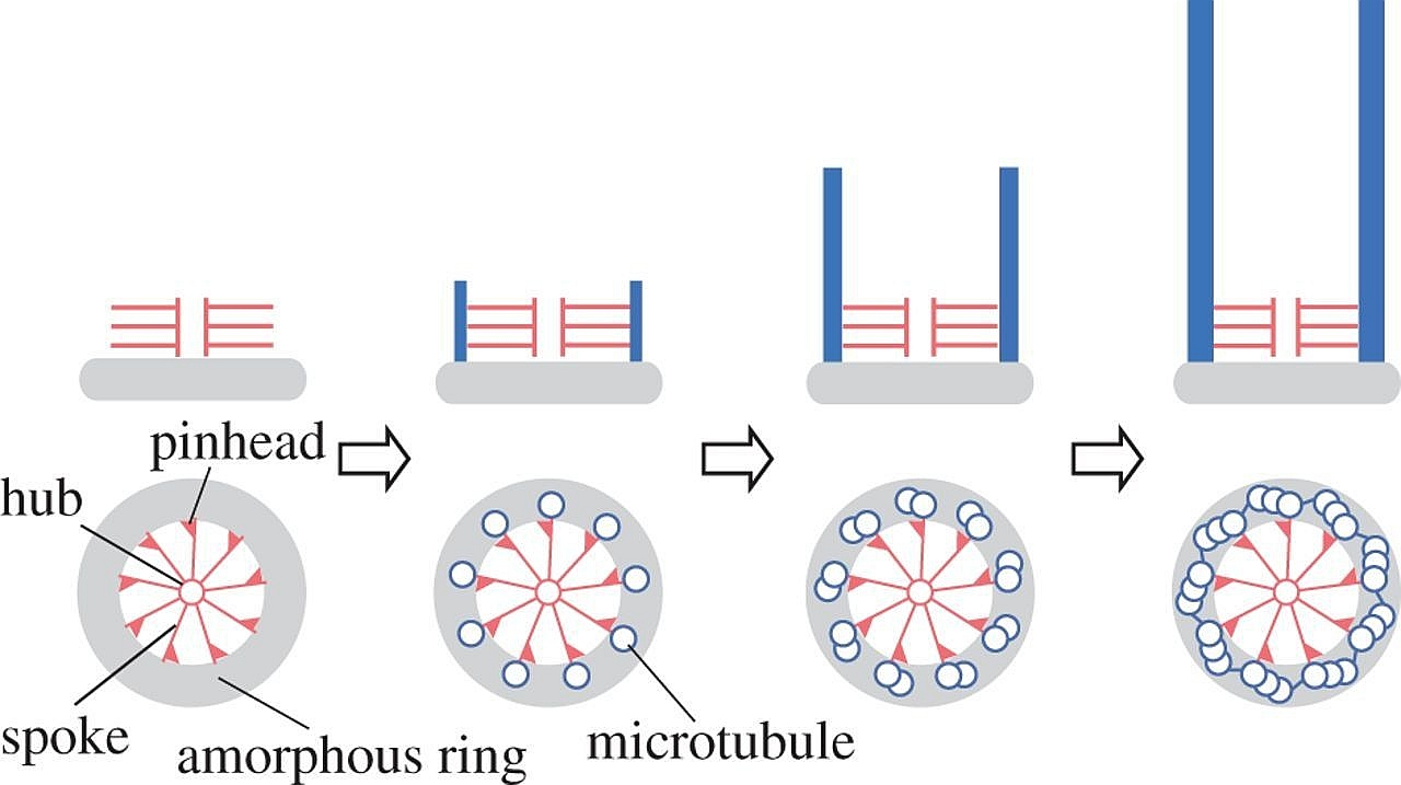 Figura 1. Rueda de carro como el andamio para el ensamblaje del centriolo. Una rueda de carro se ensambla en un anillo o disco amorfo (en gris) como la primera estructura simétrica nónuple que aparece en el proceso de ensamblaje del centriolo. Se forman microtúbulos en las puntas de los nueve radios de la rueda de carro.